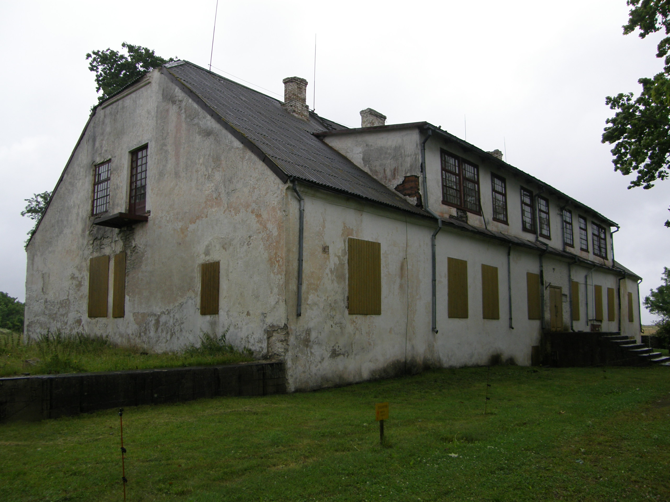 Pilguse mõisa peahoone